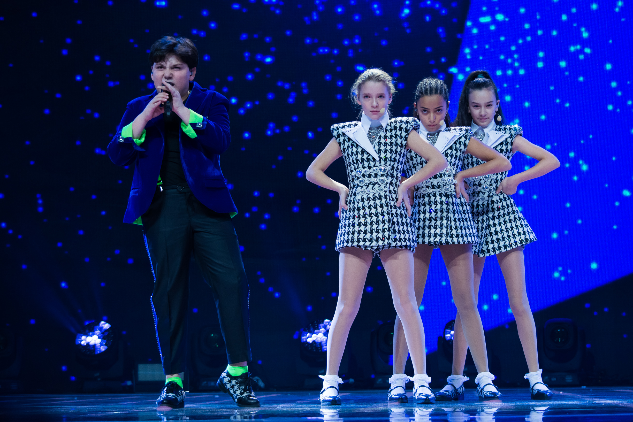 Группа «Вирус» на сцене Детского Евровидения 2015 («Армеец», София) во время генеральной репетиции